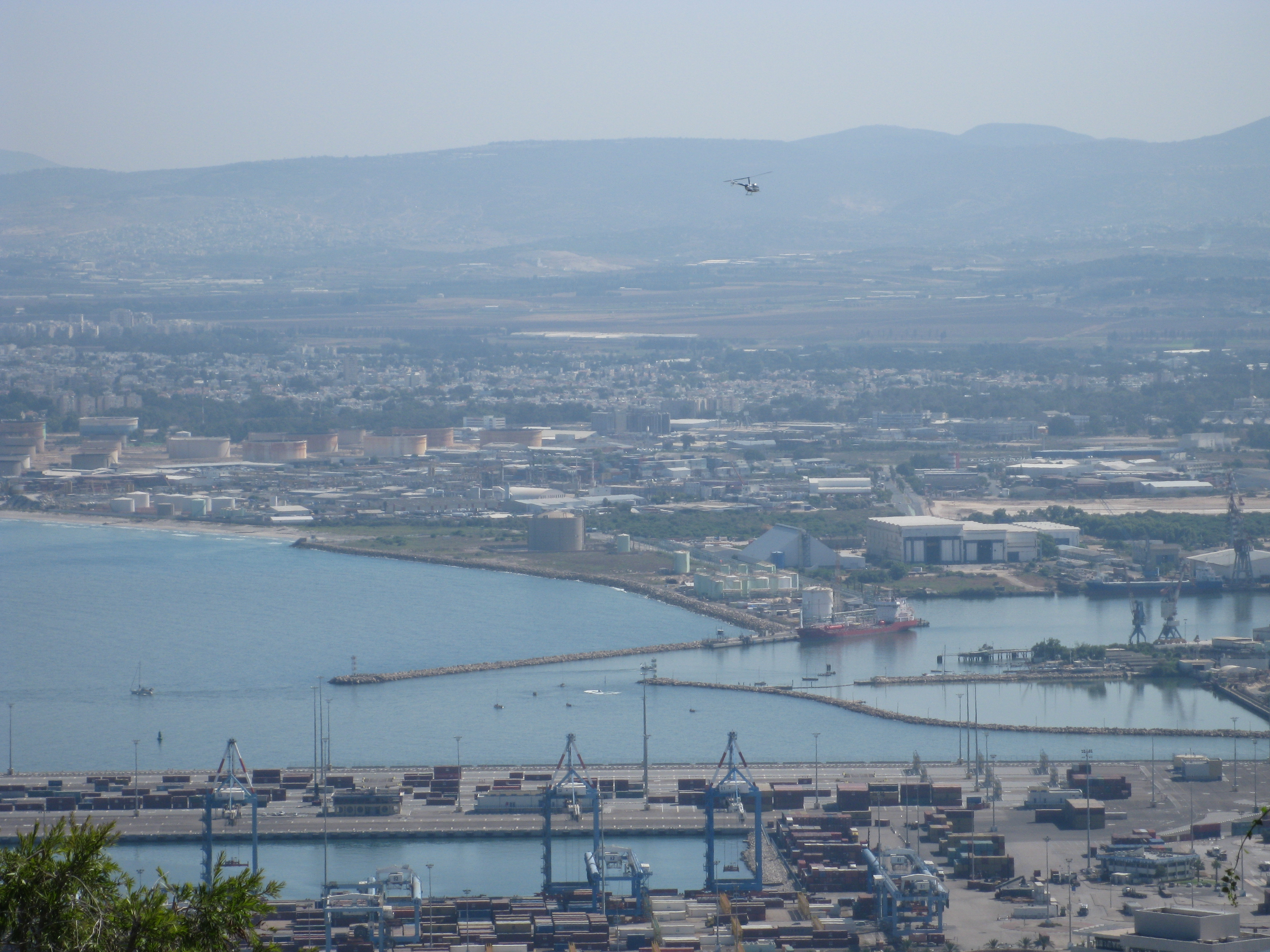 Haifa port נמל חיפה